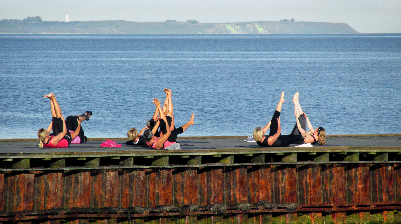 Motionsgymnastik på Brygga 0 vid Ystad Saltsjöbad 2014. Hammars backar och Kåseberga i bakgrunden.